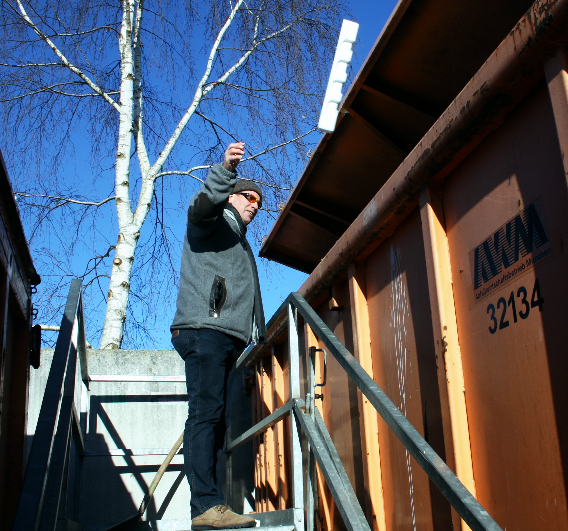 Entsorgung von Polystyrene im Wertstoffhof.